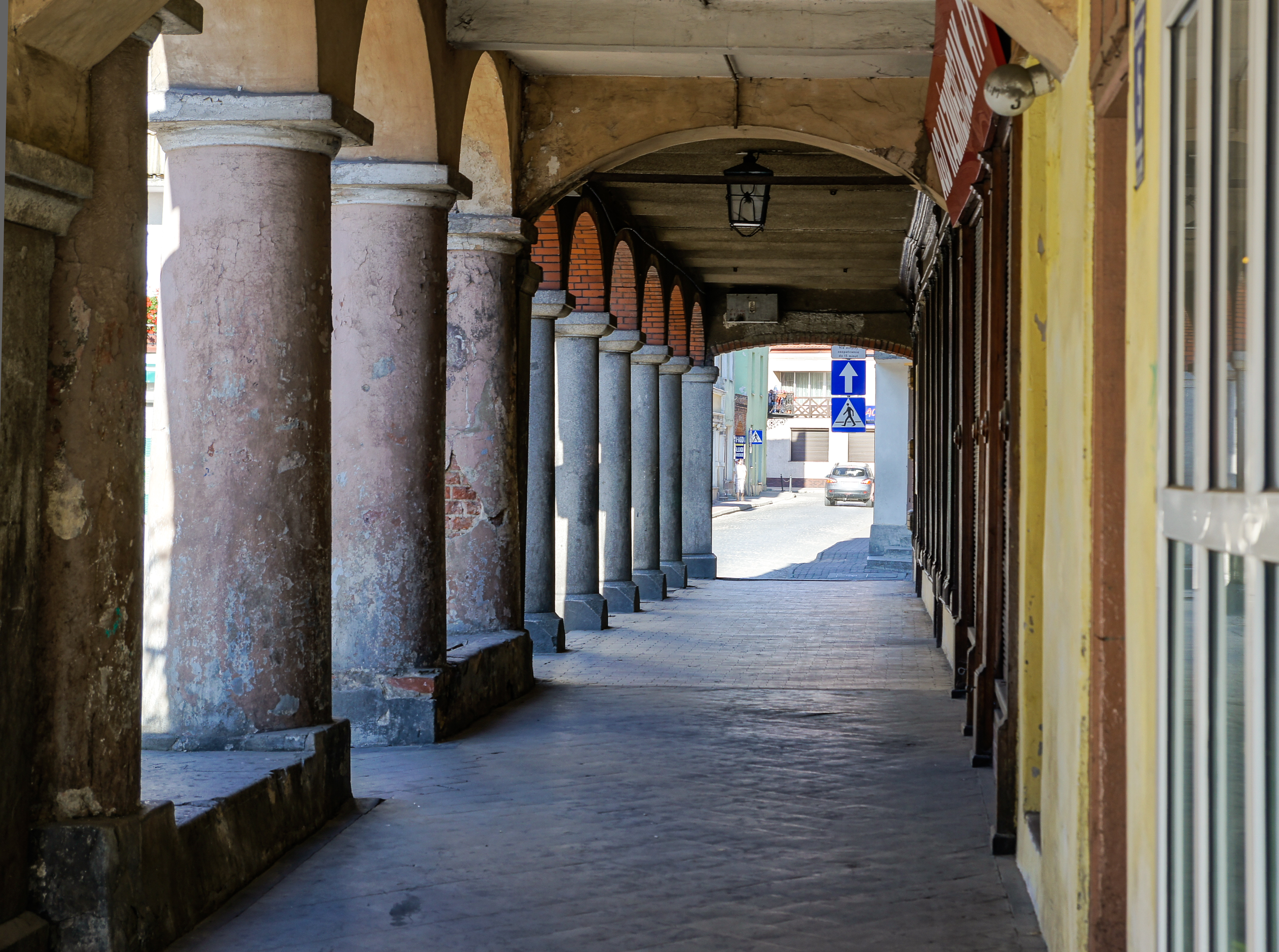 Podcienie zabytkowych kamienic przy Plac Wolności 1,3,5 w Ornecie.